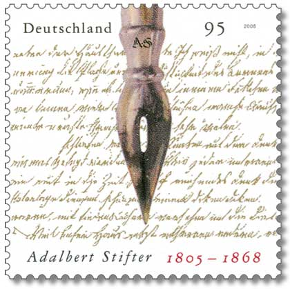 Handschrift des Dichters mit Schreibfeder; Foto Schreibfeder: © H. Zernickel; Bildvorlage Handschrift Adalbert Stifter: Bayerische Staatsbibliothek